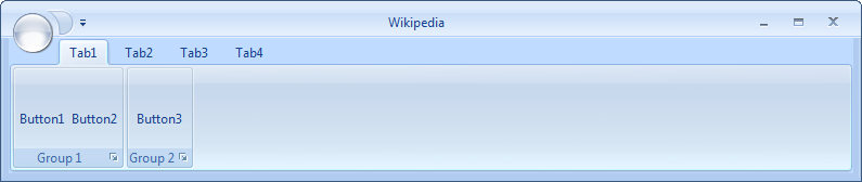 Exemple de Ruban dans une application (création personnelle)